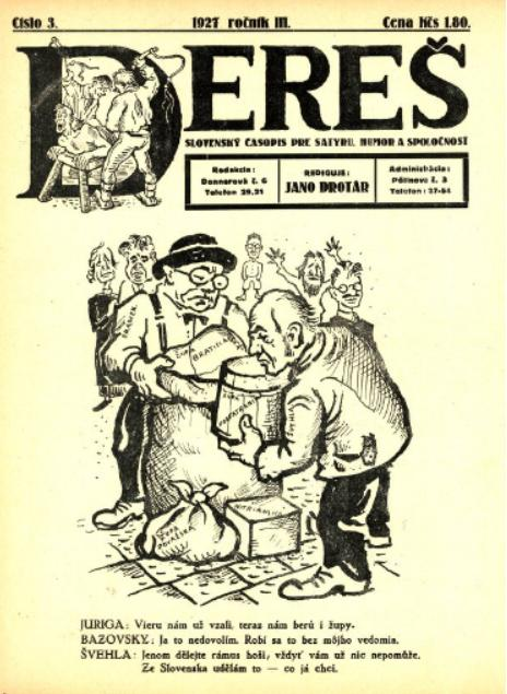 Humoristický časopis, ktorý vychádzal na Slovensku po prvej svetovej vojne, v r. 1925-1927